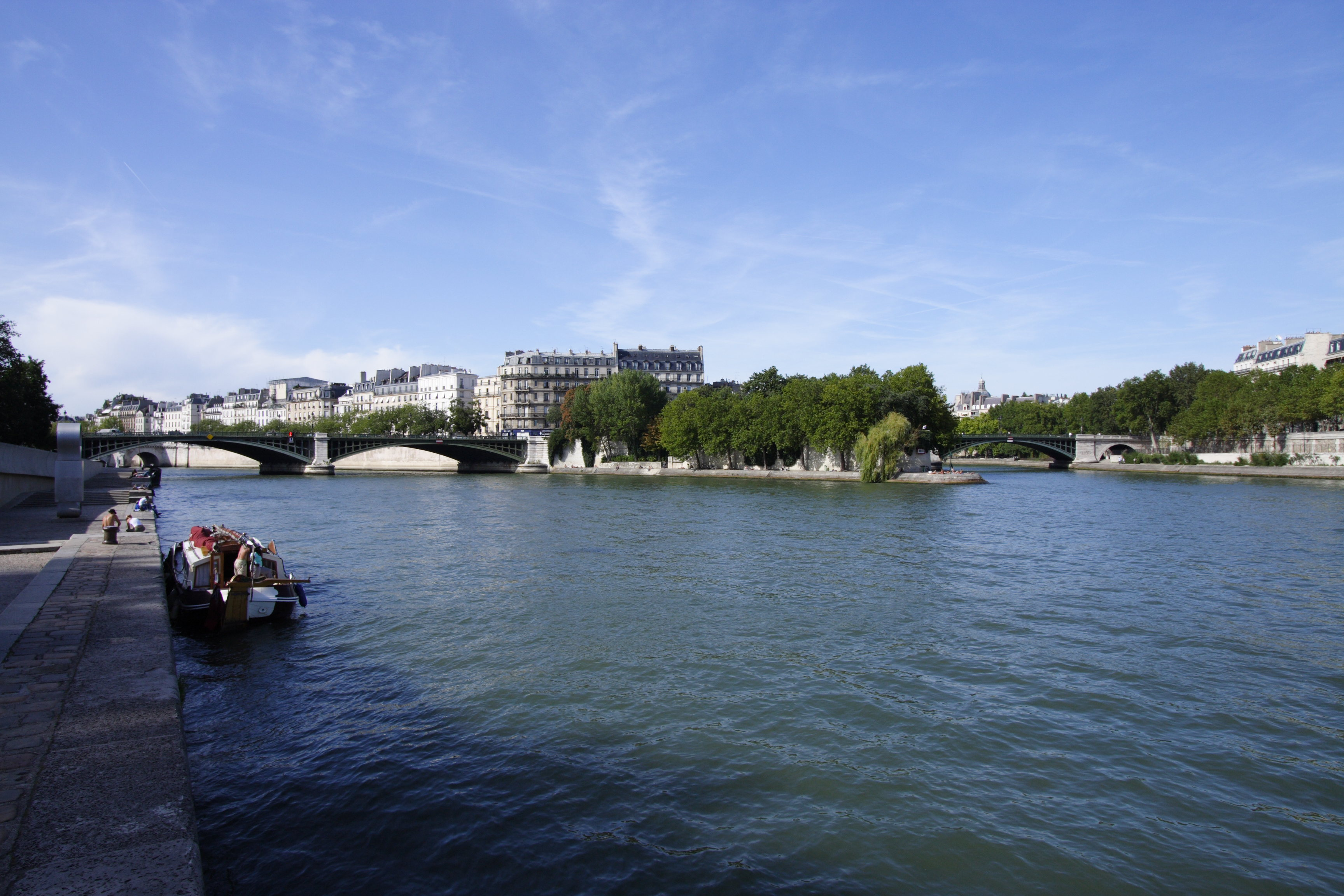 Pont de Sully(Paris, France)